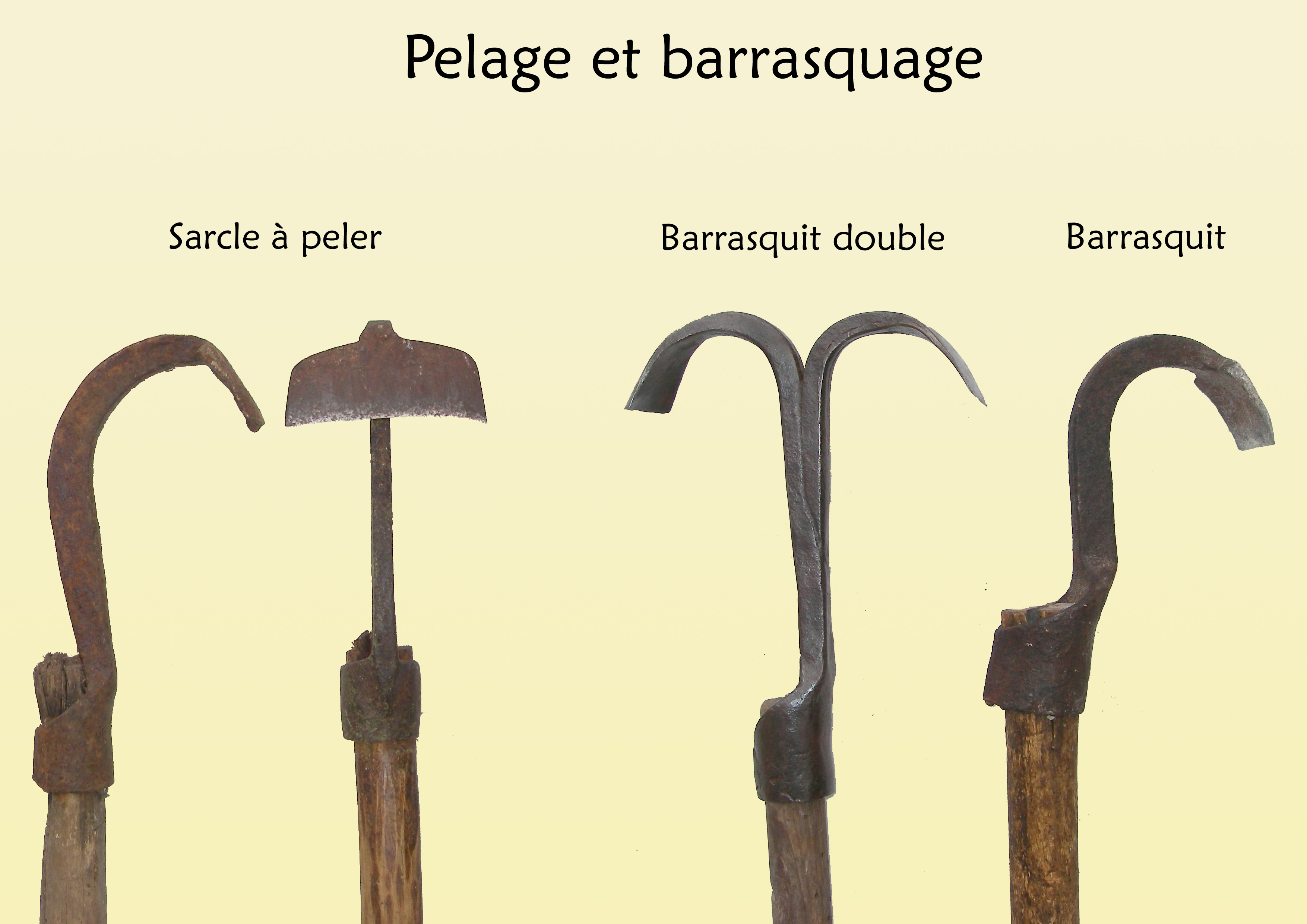 Les outils du gemmeur